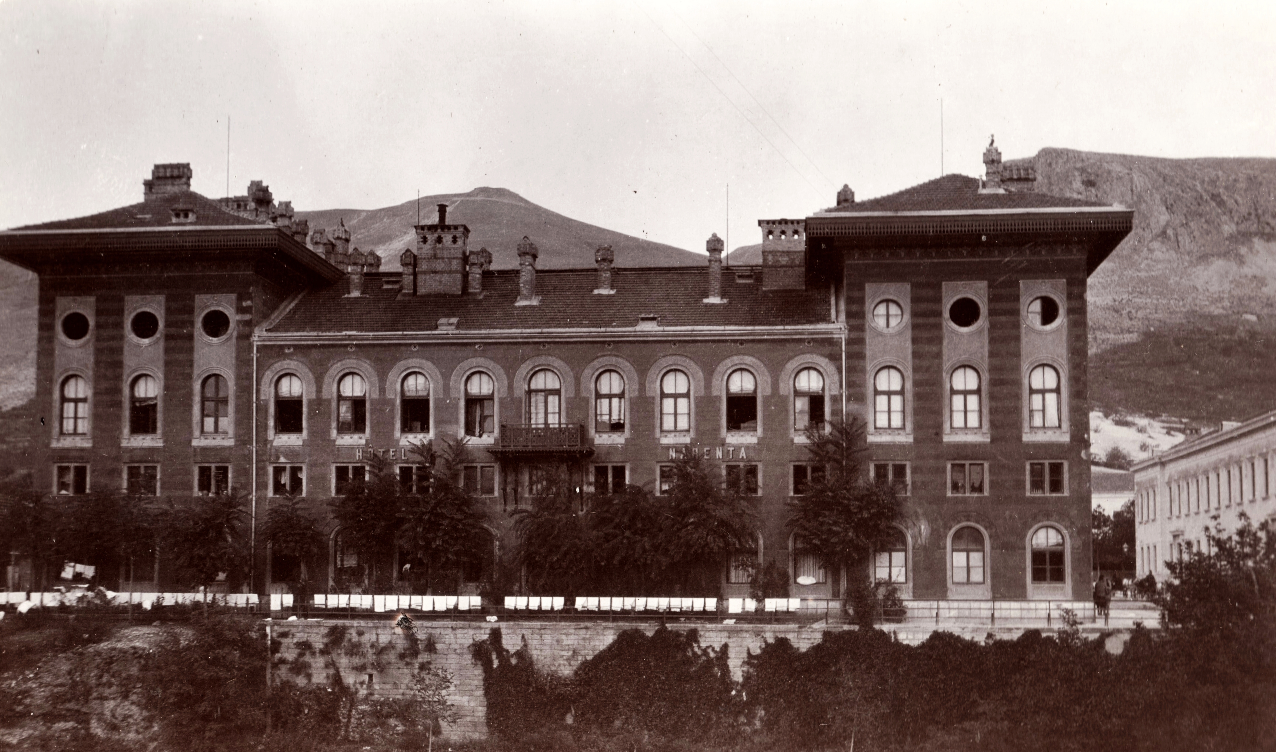 Hotel Neretva. Location: Bosnia and Herzegovina Tags: hotel, mountain, shore Title: Hotel Neretva.